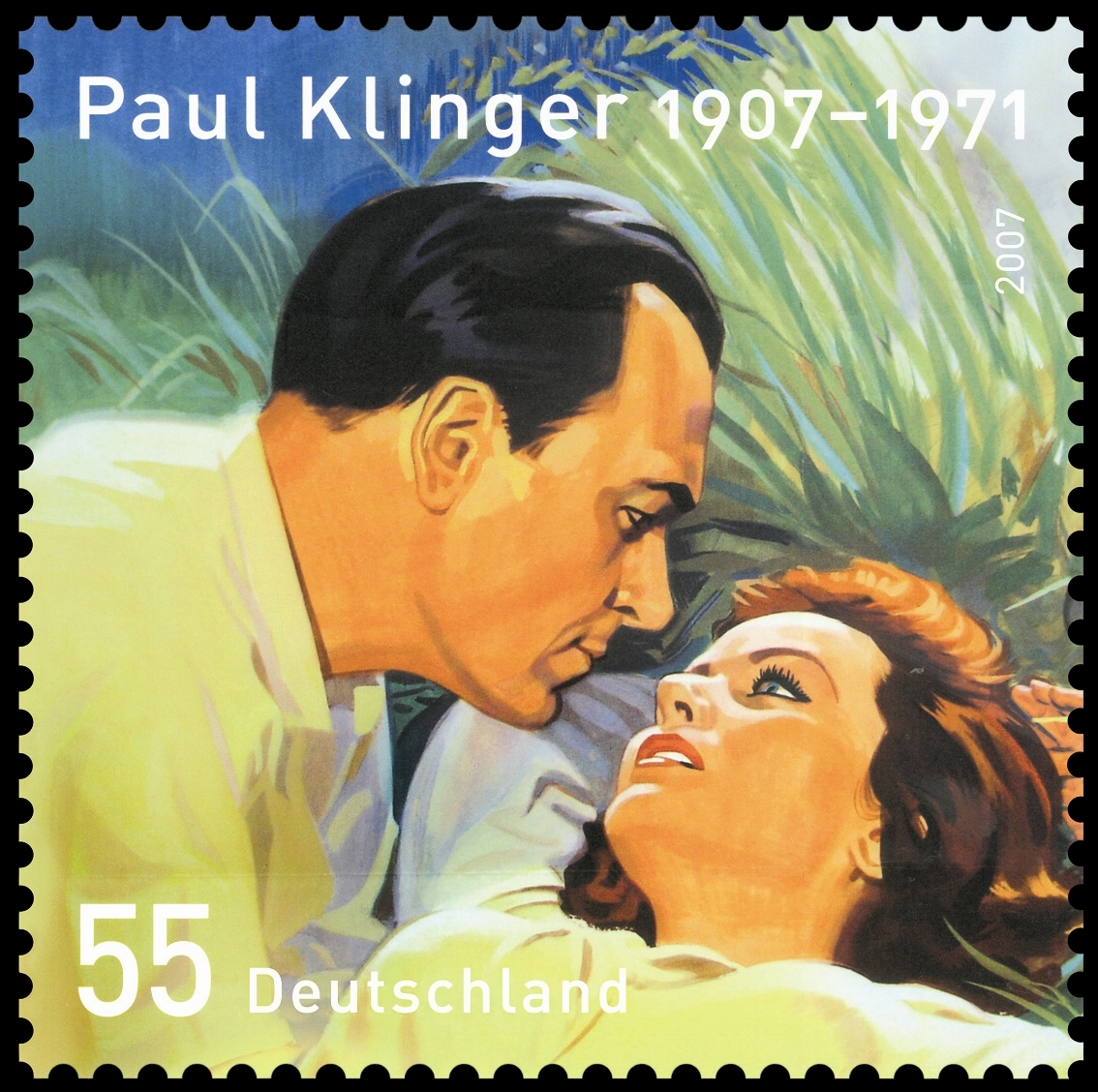 Paul Klinger (1907–1971), acteur allemand, Mi 2611